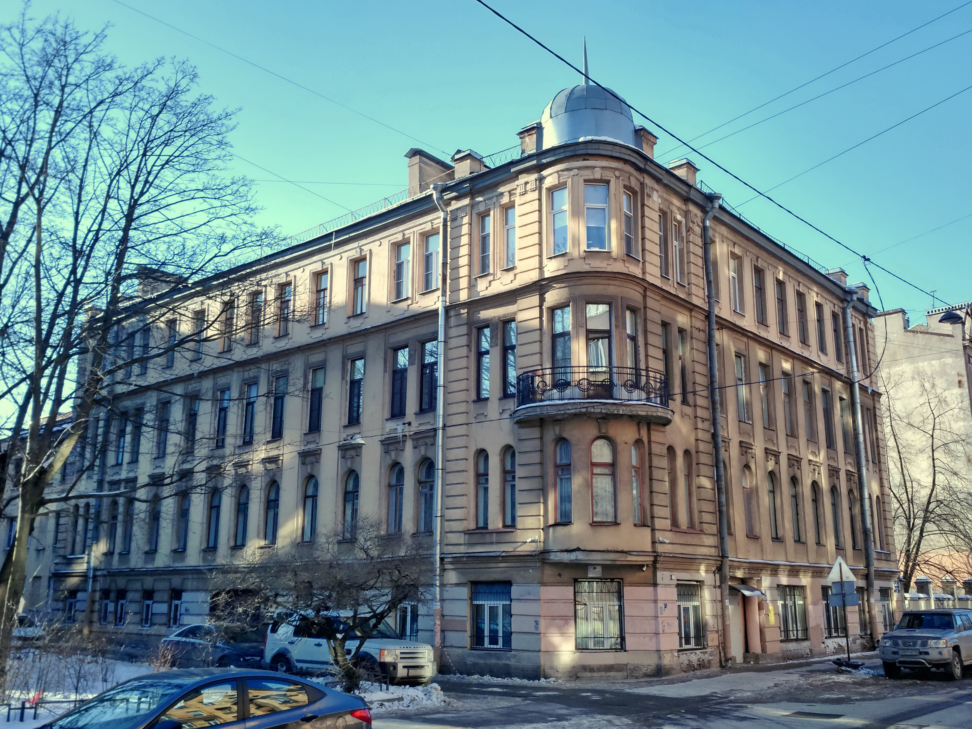 Дом №1/40 на углу Неманского переулка и 15-й линии Васильевского острова, Санкт-Петербург, Россия. Построен в 1912—1913 годах архитектором П. Н. Батуевым.